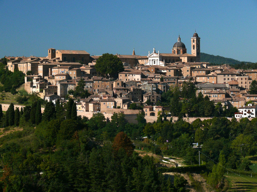 Urbino: panorama